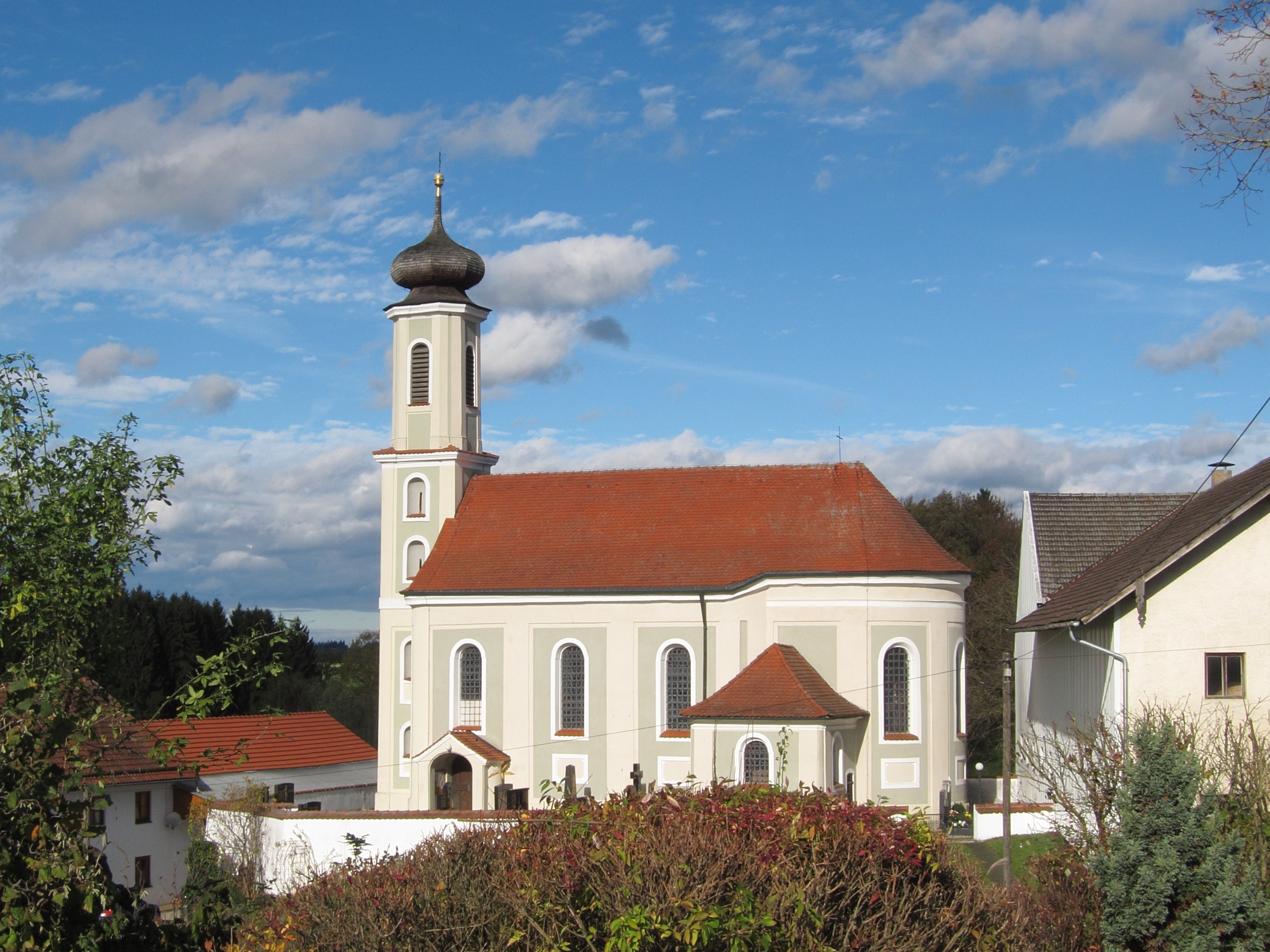 Katholische Filialkirche St. Lambertus, Saalbau mit leicht eingezogenem halbrunden Chor, angefügter Sakristei und Zwiebelturm, von Johann Baptist Lethner, um 1756/57.